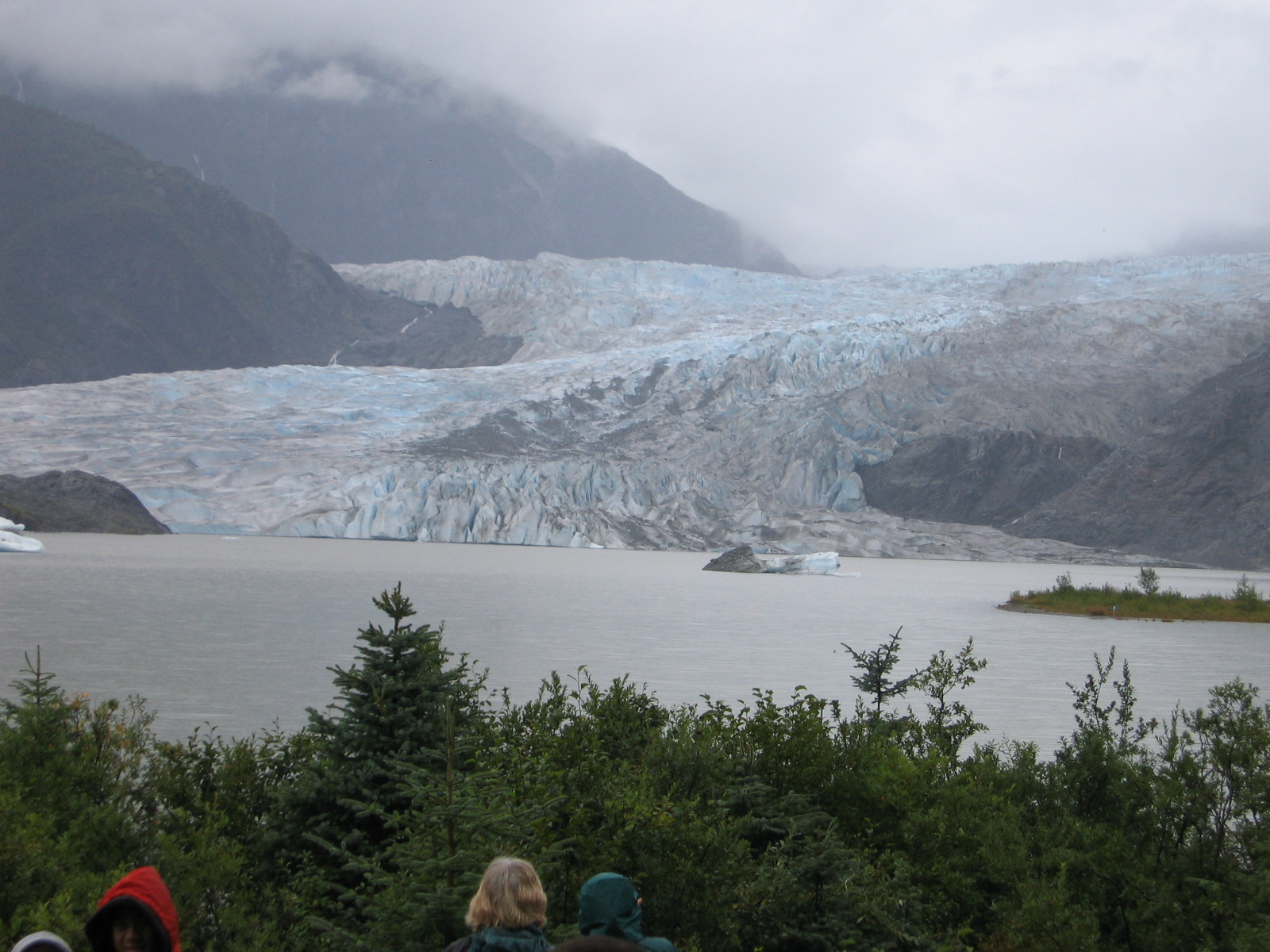 Mendenhall Glacier in Alaska